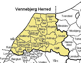 Vennebjerg Herred, Hjørring Amt, Denmark Source: Map by Svend-Erik Christiansen